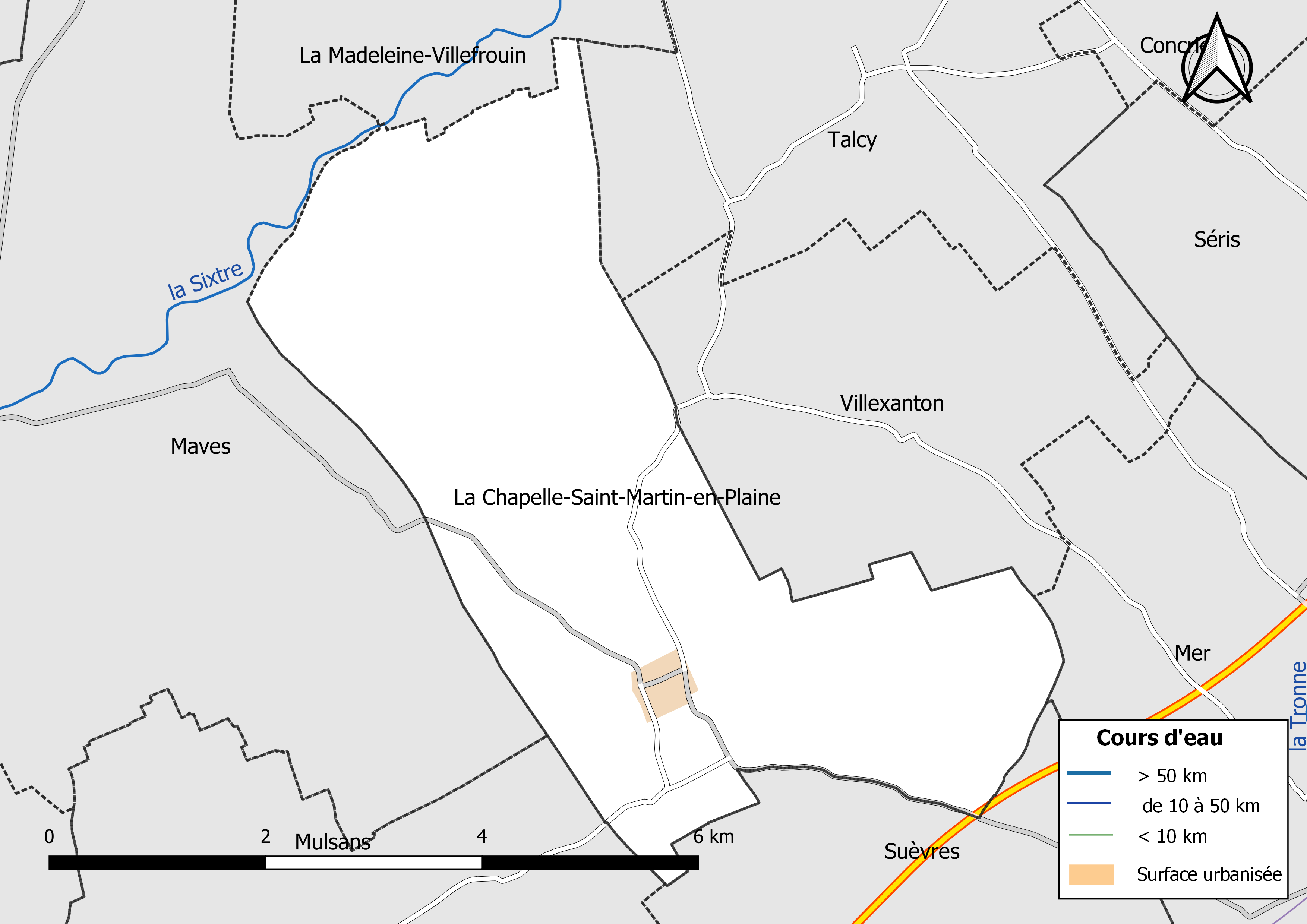 Carte du réseau hydrographique de la commune de La Chapelle-Saint-Martin-en-Plaine (Loir-et-Cher, France).